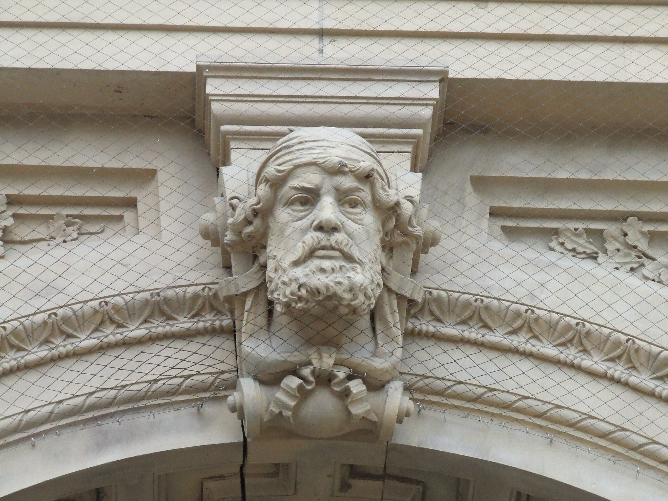 Mainz Hauptbahnhof in Mainz. Central Station, Mainz, Germany